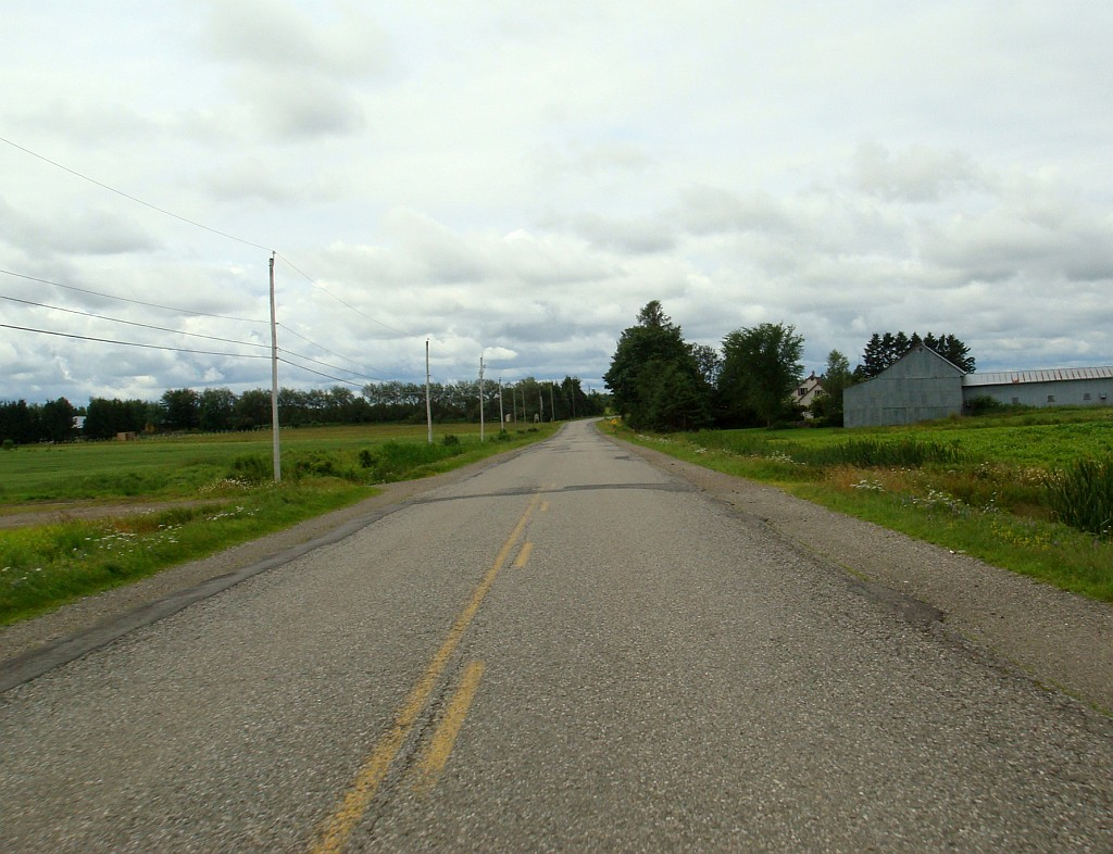 Photo de la route 218, à Saint-Gilles, Québec, Canada.